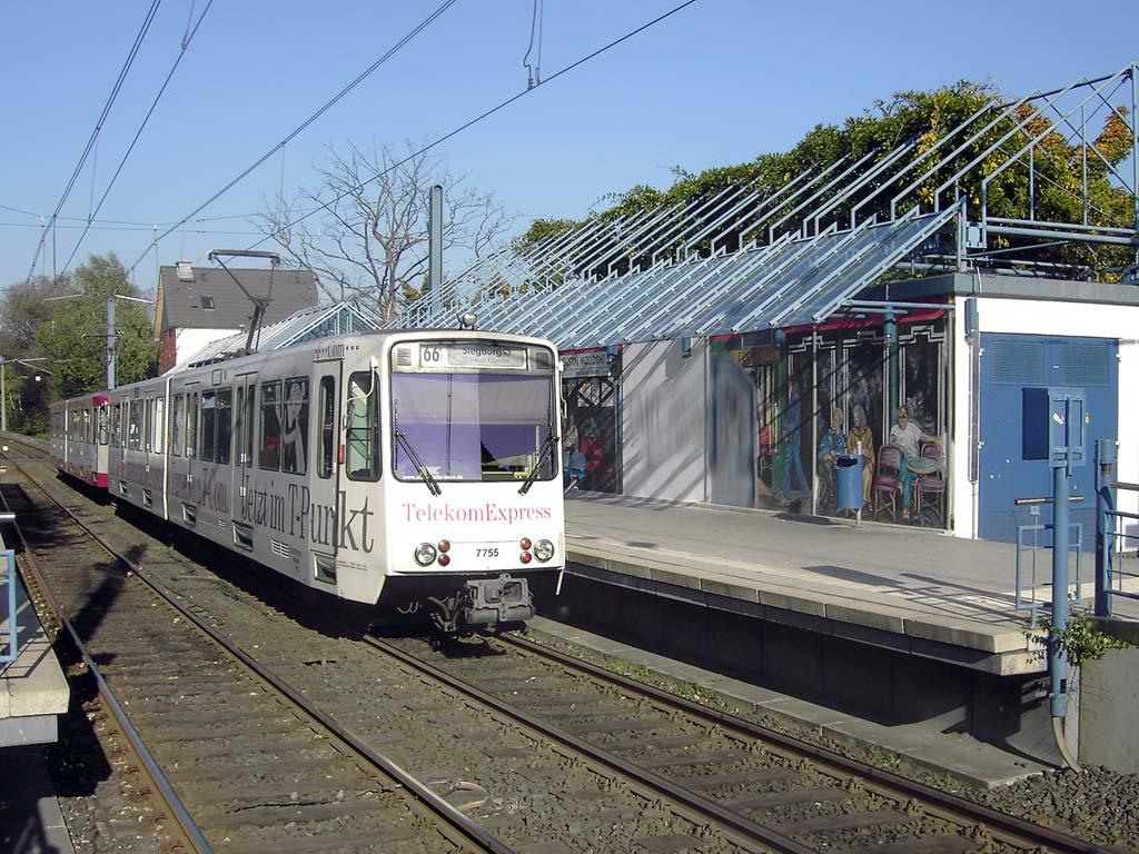 Stadtbahn Bonn: Haltestelle Sankt Augustin Mülldorf